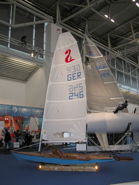 Seggerling